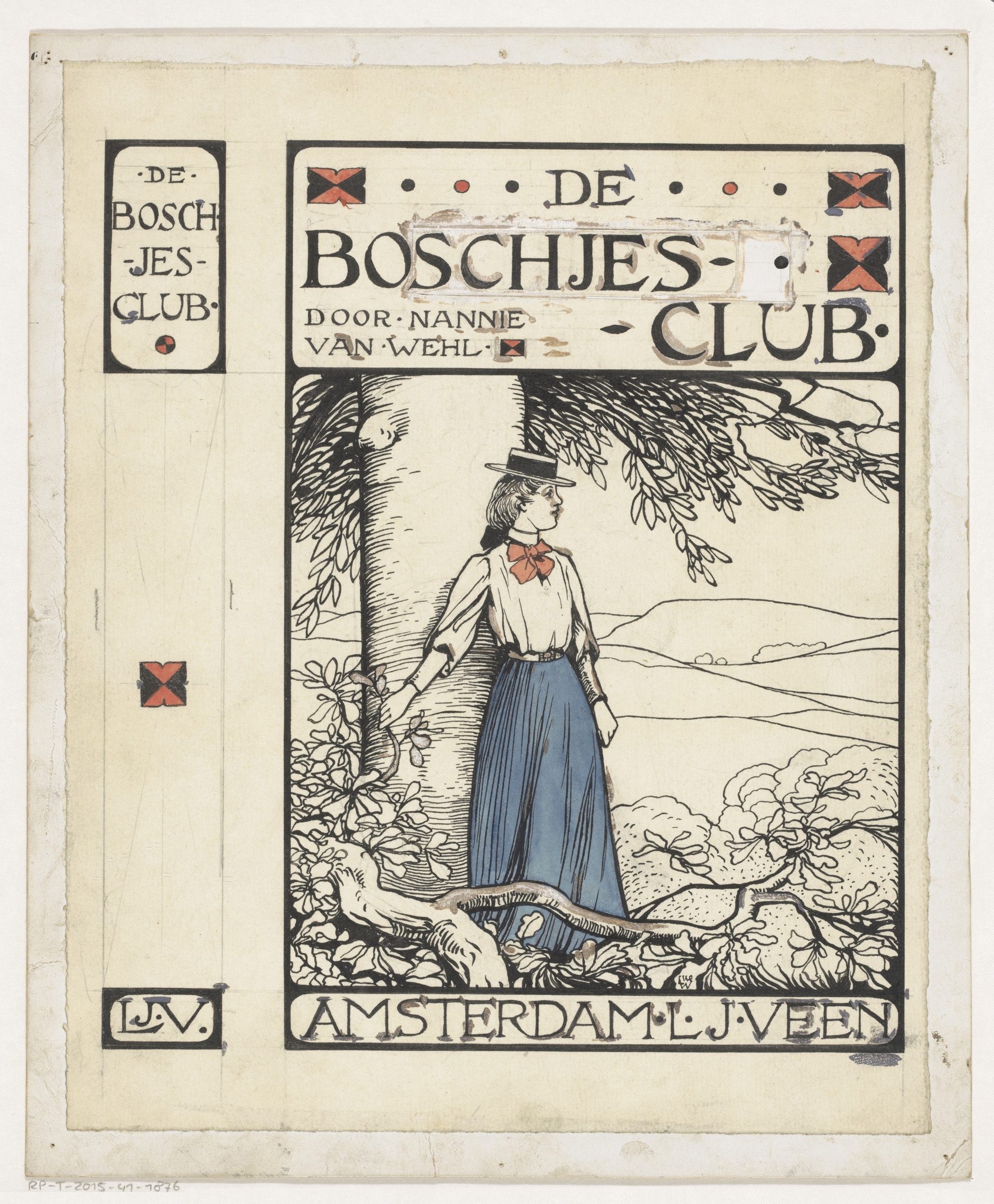 Bandontwerp van Willem Wenckebach voor 'De Boschjes-club' (1905) van Nannie van Wehl , Willem Wenckebach. Uitgeverij L.J. Veen